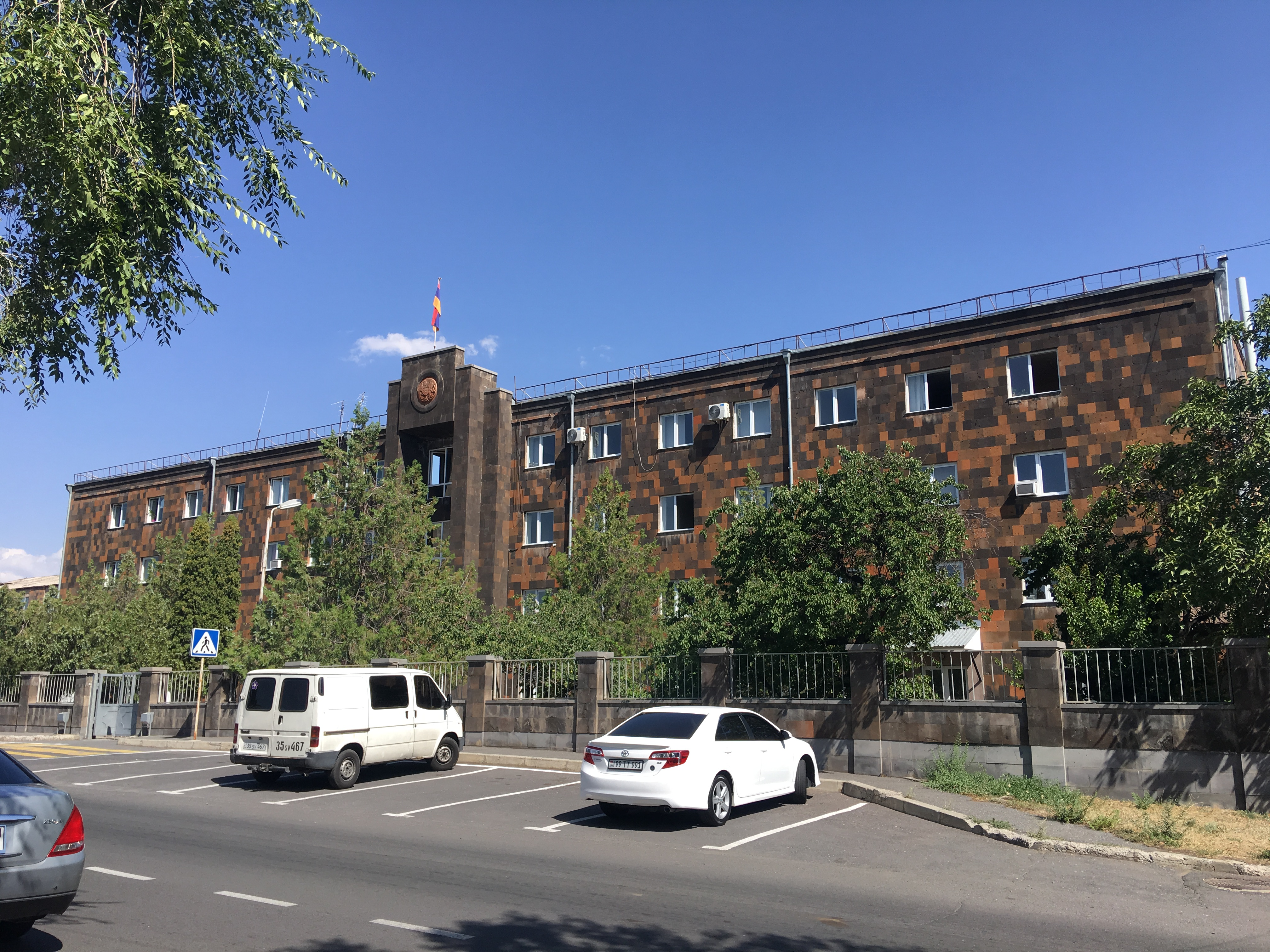 Ավան և Նոր Նորք վարչական շրջանների ընդհանուր իրավասության դատարան, Երևան, Հայաստան